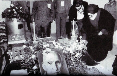 آیت الله محمود طالقانی برسر مزار دکتر محمد مصدق در احمد آباد